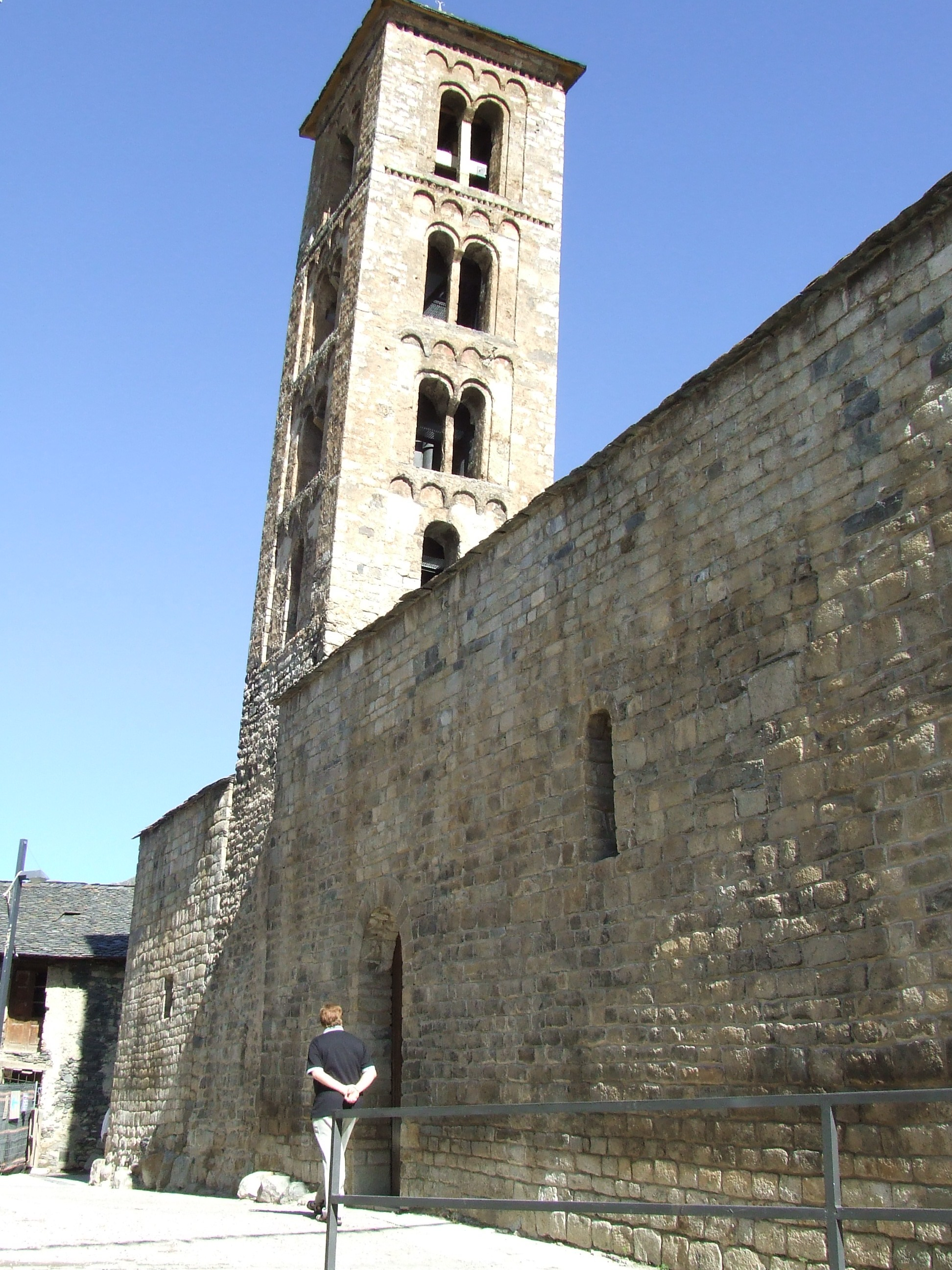 Mur meridional i campanar de Santa Maria de Taüll (Vall de Boí, Alta Ribagorça)